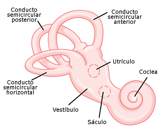 Esquema del oído interno con los rótulos en español.